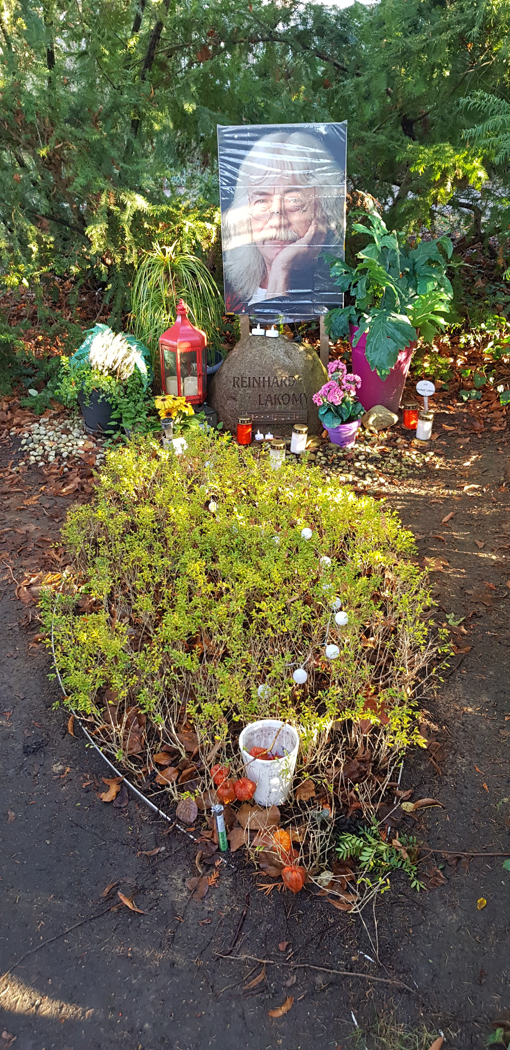 Reinhard Lakomys Grab in Berlin-Blankenburg